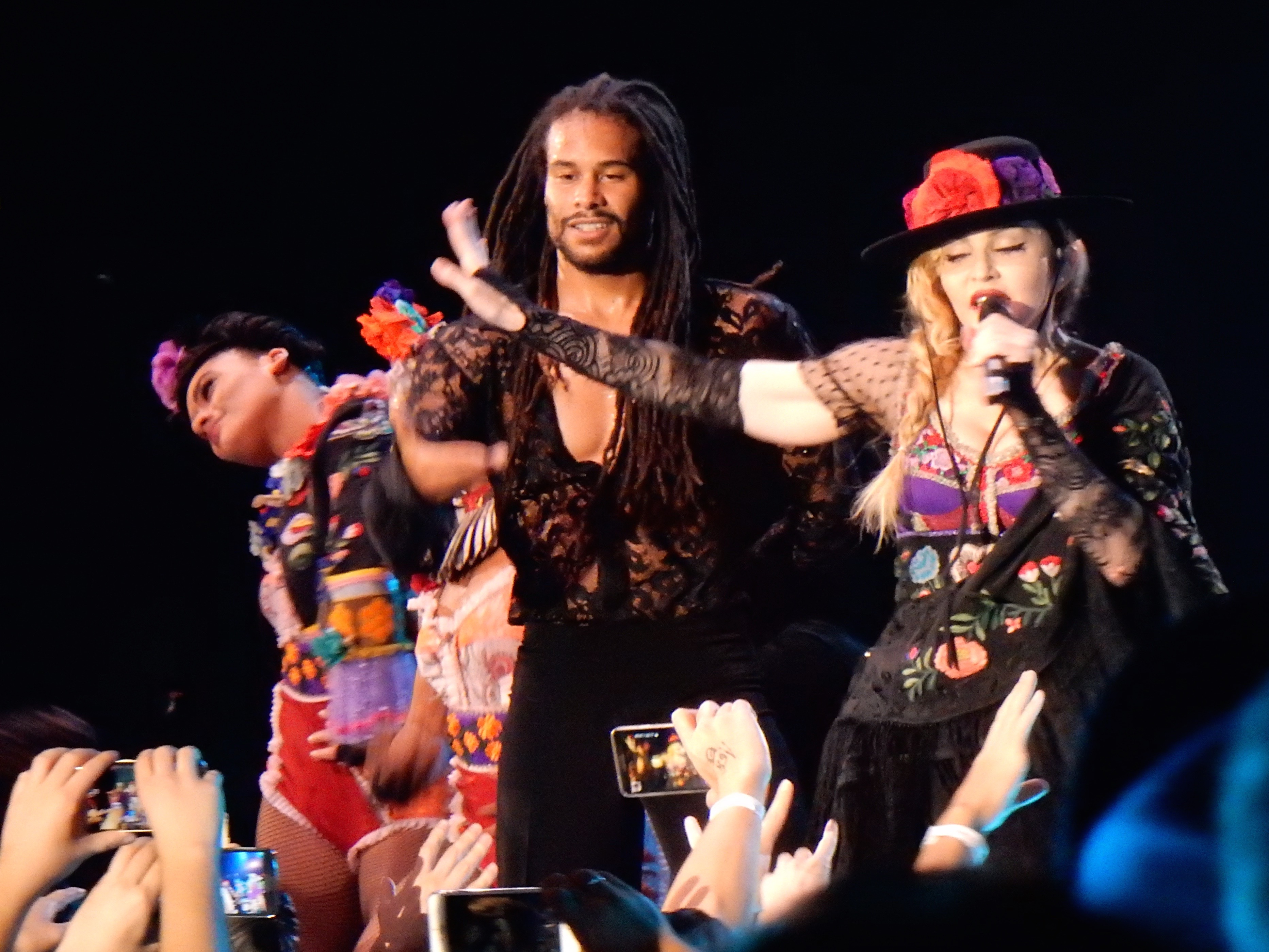 Madonna - Rebel Heart Toru 2015 - Prague 1